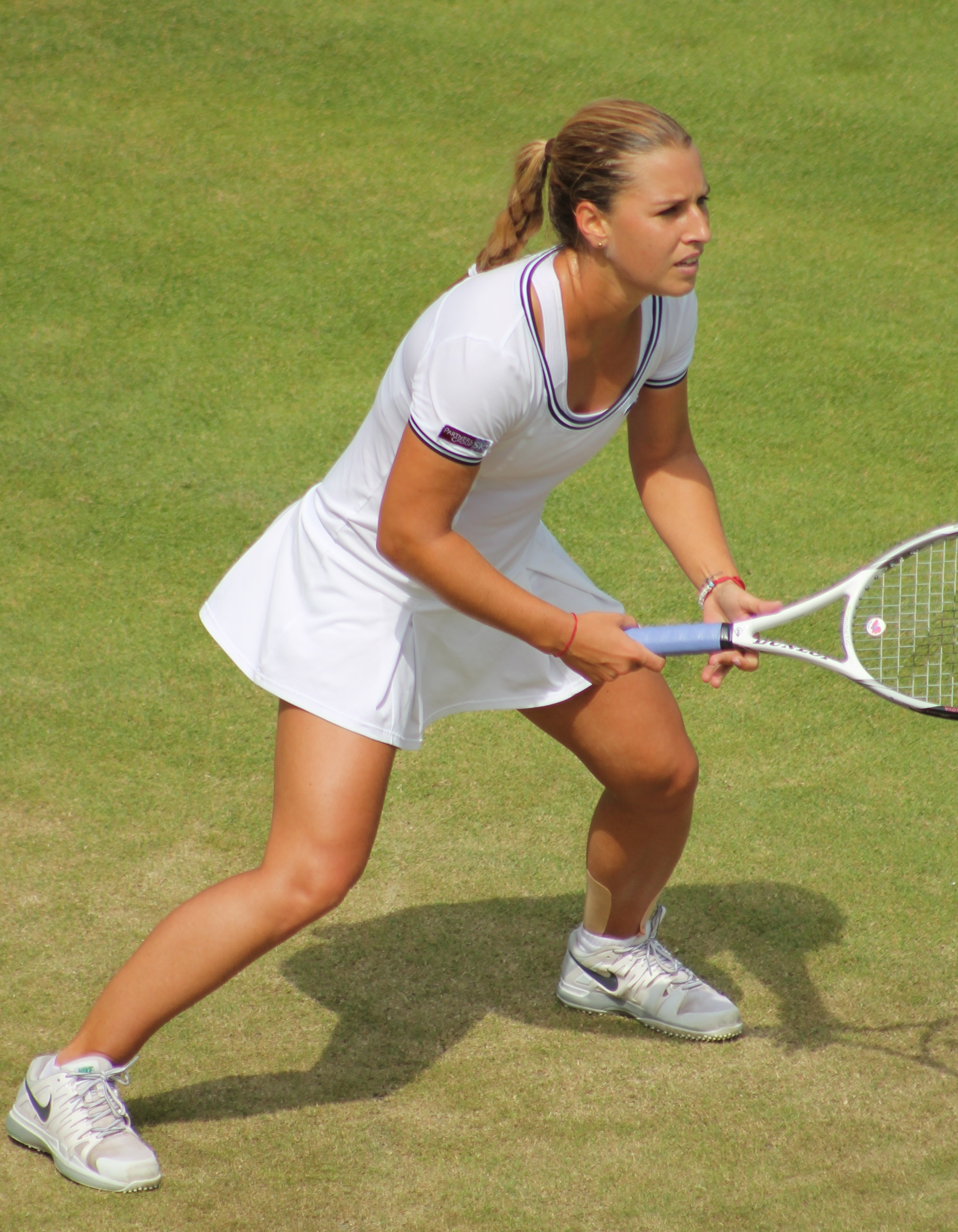 Dominika Cibulková at 2013 Wimbledon